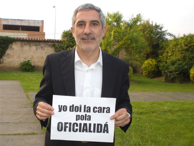 Gaspar Llamazares apoyando la oficialidad del asturiano.